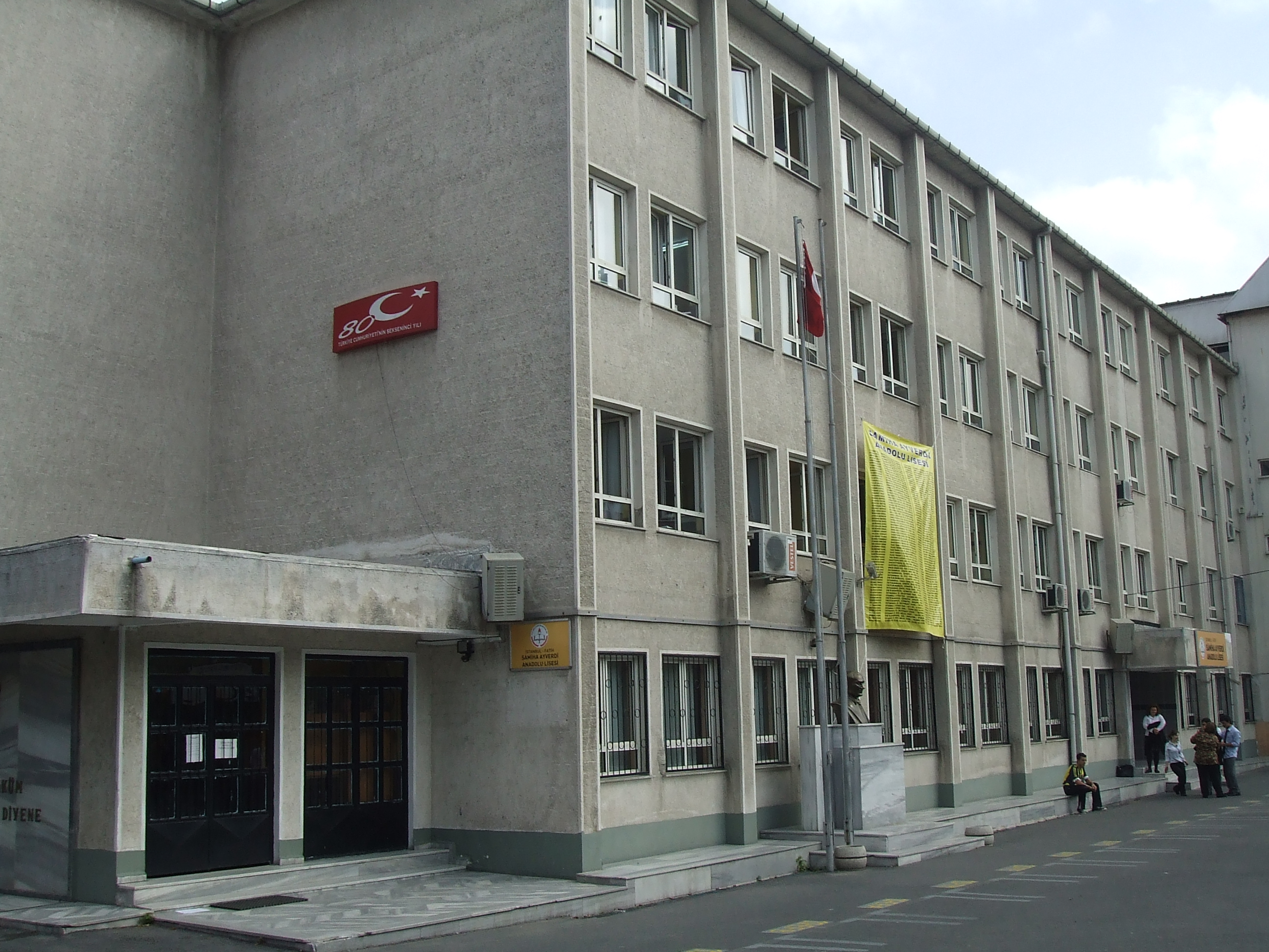 Samiha Ayverdi Anadolu Lisesi, Fatih, İstanbul, Türkiye